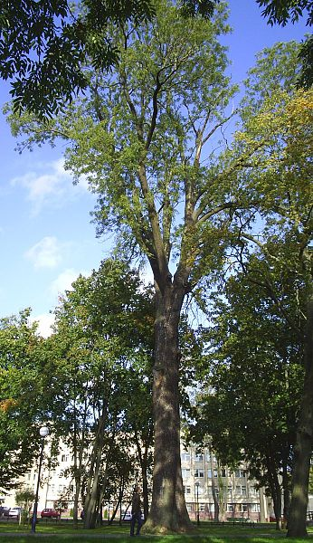 Стары ясень (Fraxinus) у парку Жылібера, Гродна, восень 2006.